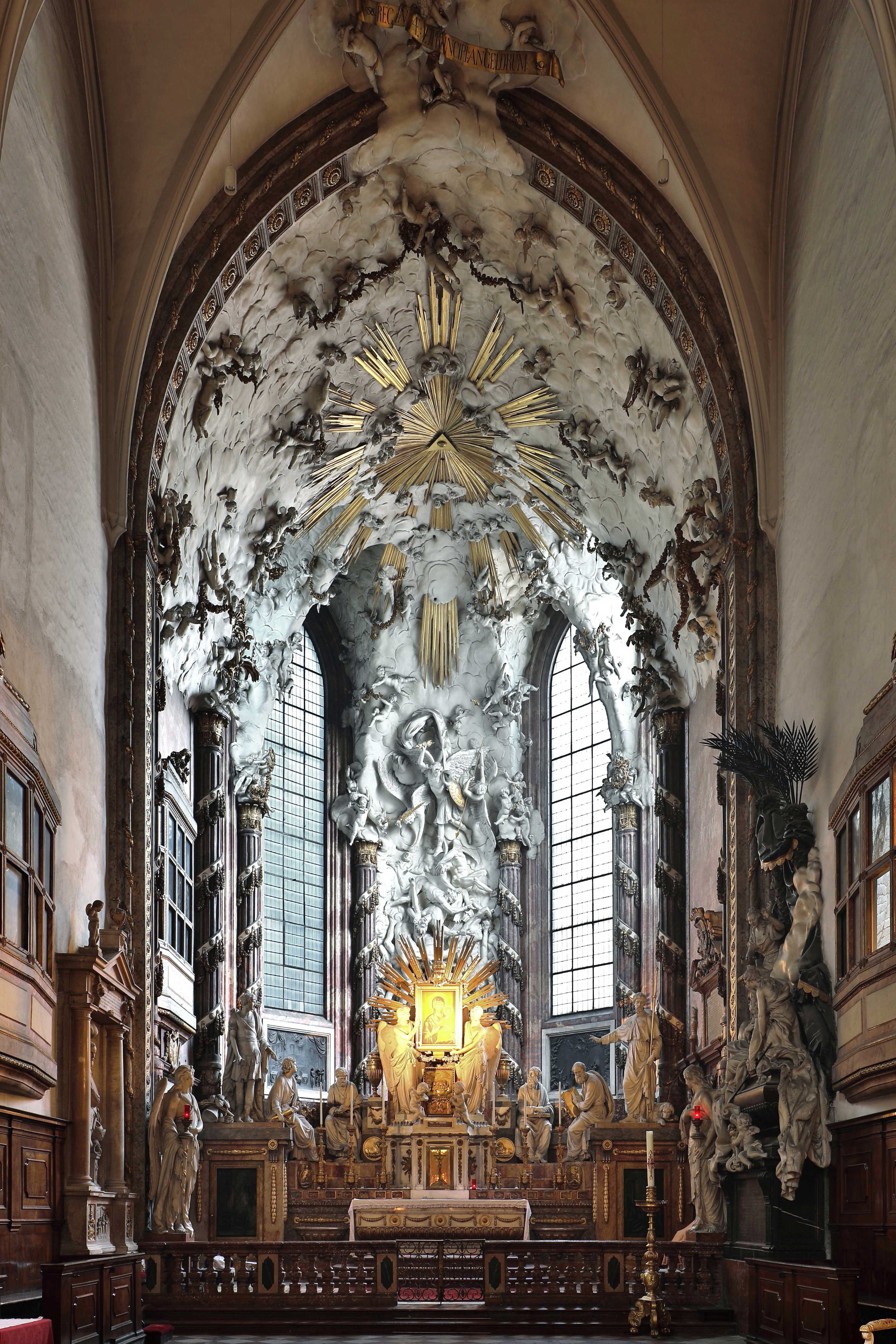 Hochaltar der Michaelerkirche im 1. Bezirk der österreichischen Bundeshauptstadt Wien.Die heutige Pfarr- und Klosterkirche der Salvatorianer wurde 1220 errichtet und war bereits 1288 einer der 3 Stadtpfarrkirchen. Nach mehreren Großbränden und einem Erdbeben wurde die Kirche mehrfach umgebaut.Die Barockisierung des gotischen Chores erfolgte nach einem Entwurf (1781) von Jean Baptiste d'Avrange (1728-1789). Die Figuren des Hochaltars stammen von Johann Martin Fischer (vier Evangelistenstatuen) und Philipp Jakob Prokop (zwei Putti, vier Engel sowie die Statuen des heiligen Rochus und des heiligen Sebastian). Über den Tabernakel befindet sich das Gnadenbild Maria Candia, eine Ikone aus dem 16. Jahrhundert. Das Engelsturz-Stuckrelief vom Chorgewölbe bis hinunter zum Altar an der Chorscheitelwand (Chorschluss) schuf der Bildhauer Karl Georg Merville (1745–1798), ebenso den Wolkenhimmel. Die Bronzeornamente am Tabernakel, an der Tumba und an den Säulen stammen von Benedikt Henrici, der auch das vergoldete Relief mit dem Lamm Gottes über dem Tabernakel schuf. An Marmor wurde eher welcher mit blasser Farbe verarbeitet, außer beim Altartisch und bei der Mensaverkleidung. Für diese Steinmetzarbeiten wurde Stefan Gabriel Steinböck beauftragt.